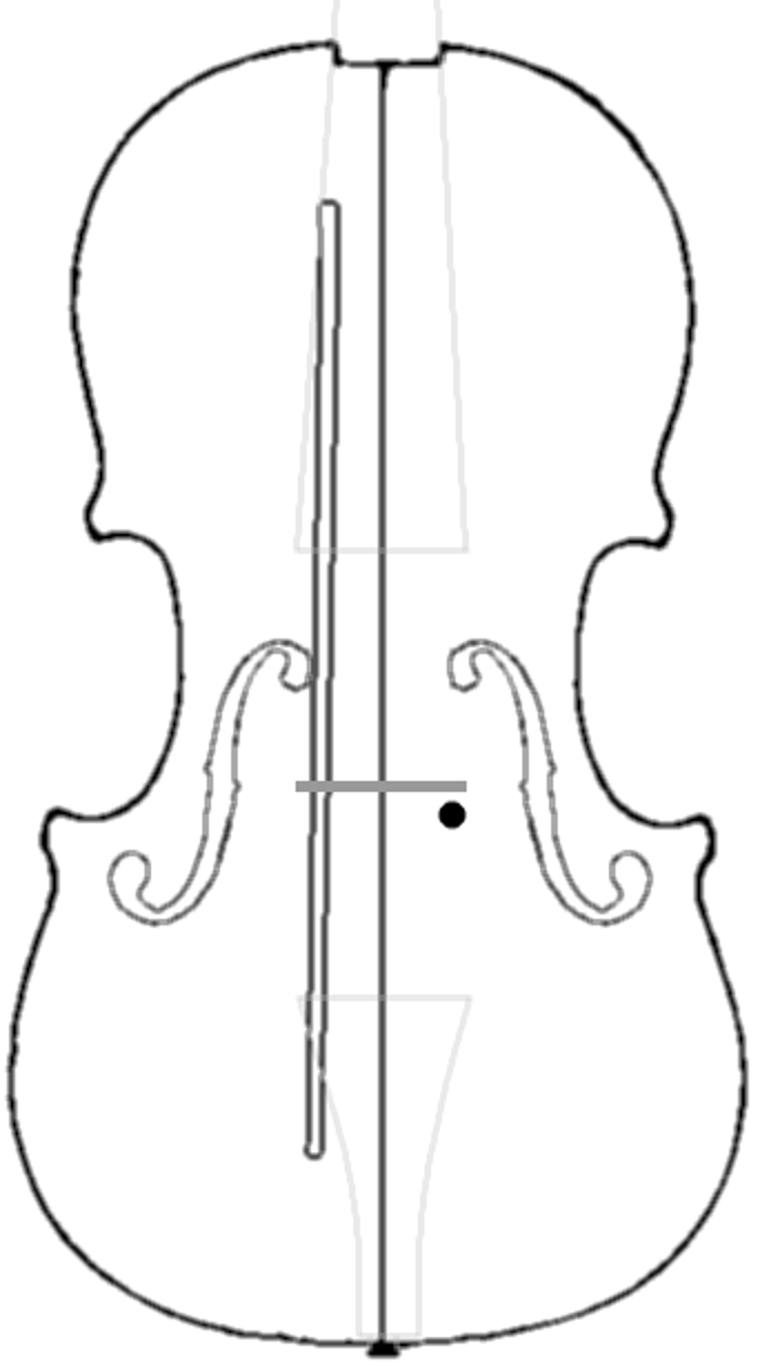 Schematische Darstellung des Violinenkorpus von oben (auf die Decke gesehen). Eingezeichnet ist die Position des Bassbalkens, der sich im Korpus - an die Decke geleimt - befindet und die Position des Stimmstocks der zwischen Decke und Boden geklemmt ist. In grau sind darüber Griffbrett, Steg und Saitenhalter eingezeichnet.